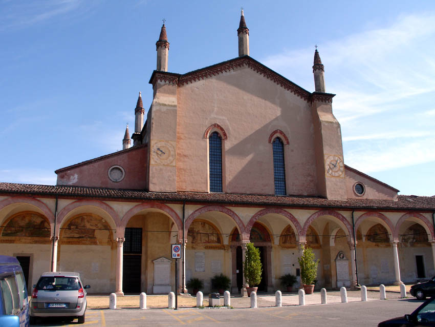 La facciata del Santuario della Beata Vergine Maria delle Grazie nella localita' Le Grazie, frazione di Curtatone vicino a Mantova